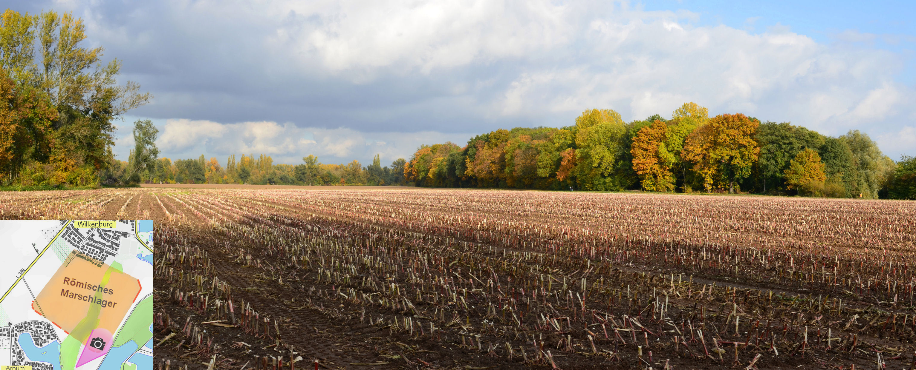 Blick auf eine Ackerfläche im Ostbereich des römischen Marschlagers von Wilkenburg mit Lageskizze des Lagers und Einzeichnung des Aufnahmestandorts mit Blickwinkel